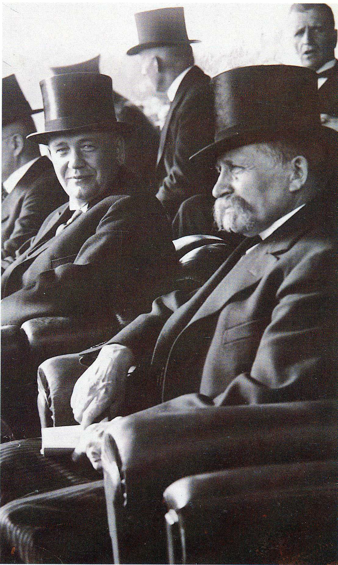 Tasavallan presidentti Lauri Kristian Relander ja Kyösti Kallio voimistelujuhlia seuraamassa.